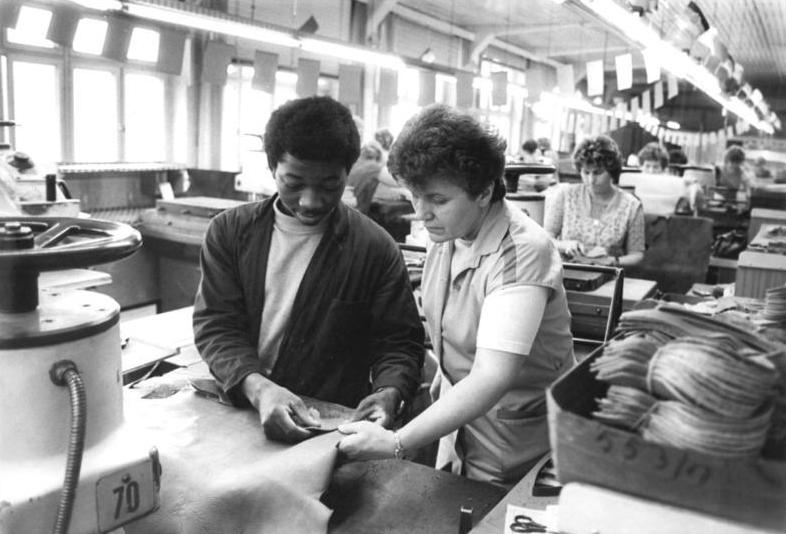 Weißenfels, Auszubildener aus Namibia ADN-ZB Lehmann 21.1.85 Bez. Halle: Junge Namibianer in der Ausbildung-Zu den jungen Namibianern, die derzeit als Schuhmacher in der Schuhfabrik "Banner des Friedens" Weißenfels ausgebildet werden, gehört auch der 20jährige Leonhard Kandume. Erfahrene Lehrmeister, wie Irmagard Gaebel, vermitteln praktische Fertigkeiten. Nach Abschluß der Lehre kehren die Facharbeiter in ihre Heimat zurück, wo sie ihren erlernten Beruf ausüben werden.